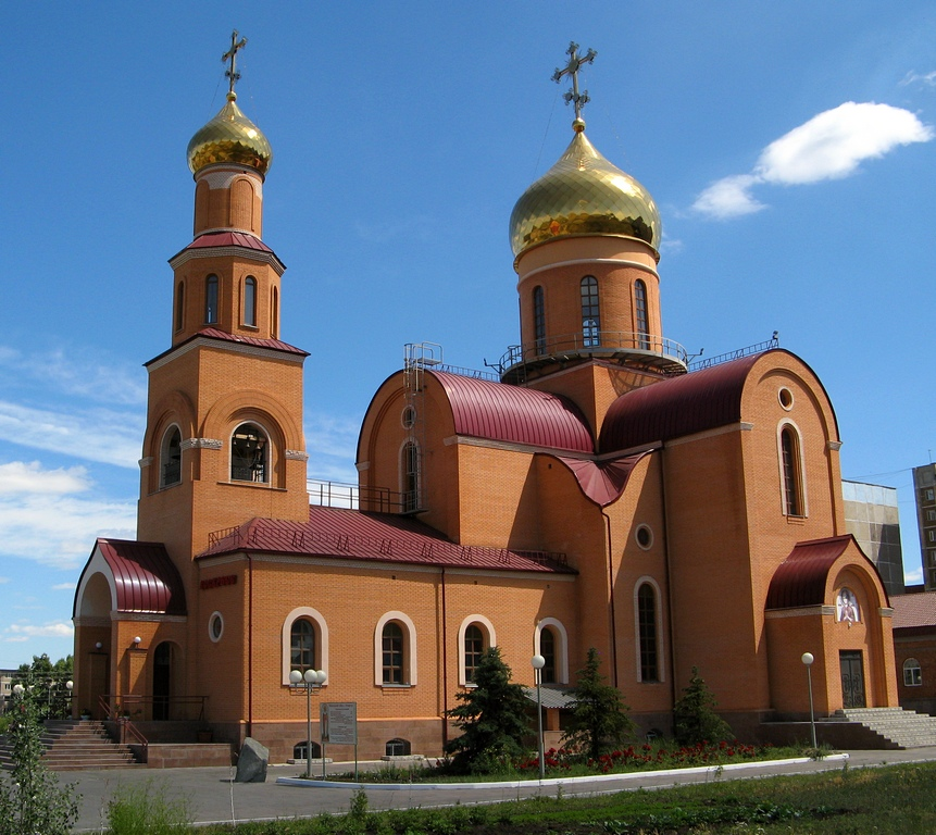 Никольский собор